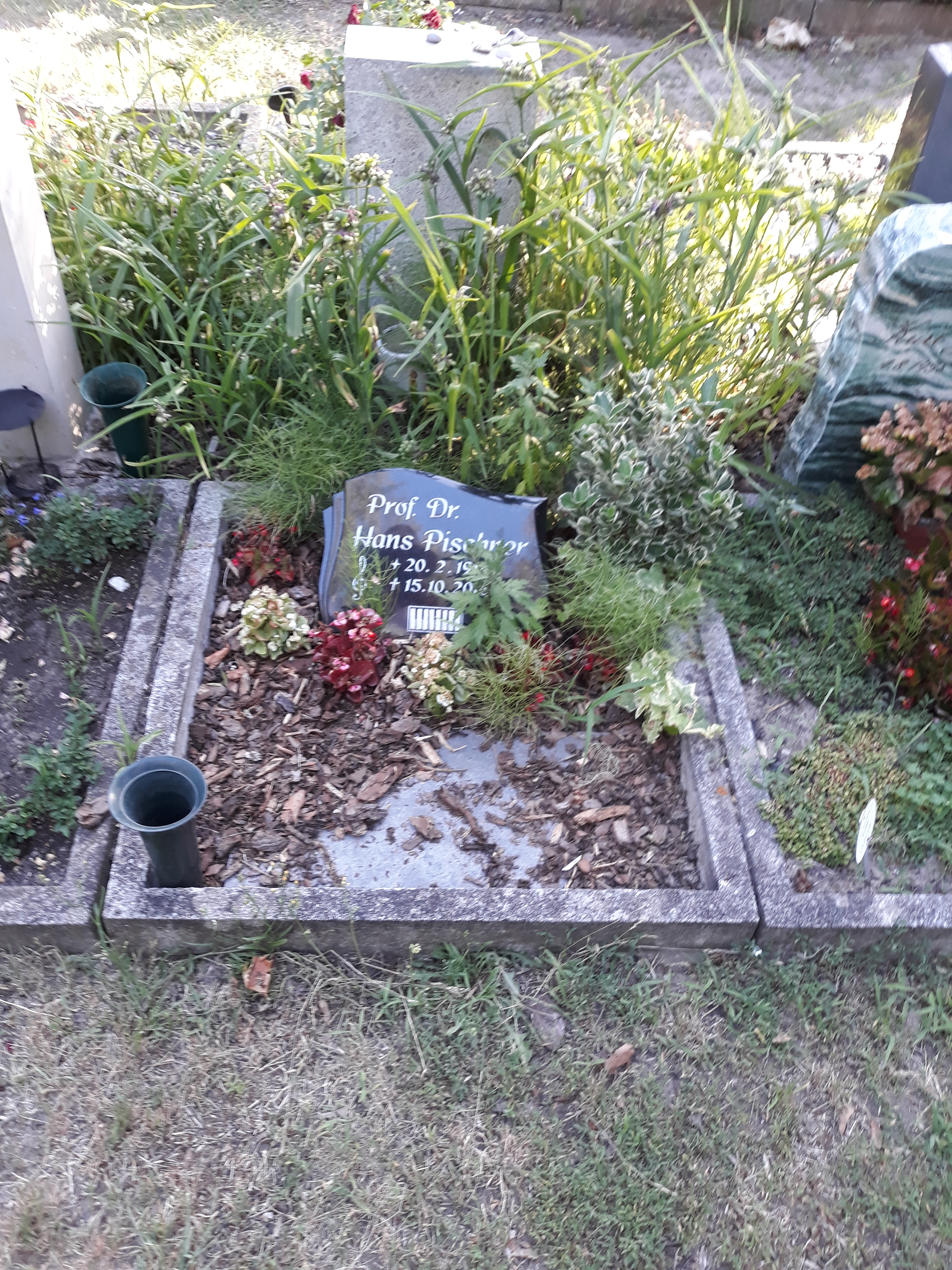 Das Grab des deutschen Cembalisten und Kulturfunktionärs Hans Pischner auf dem Dorotheenstädtischen Friedhof in Berlin.